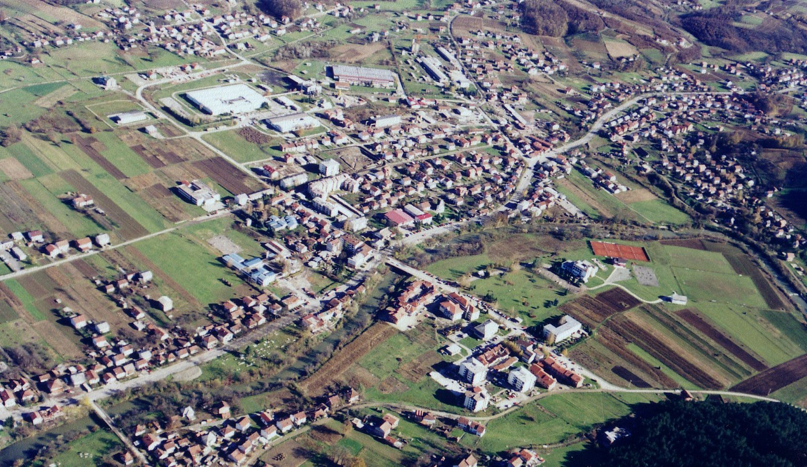 Čelinac, pogled iz helikoptera